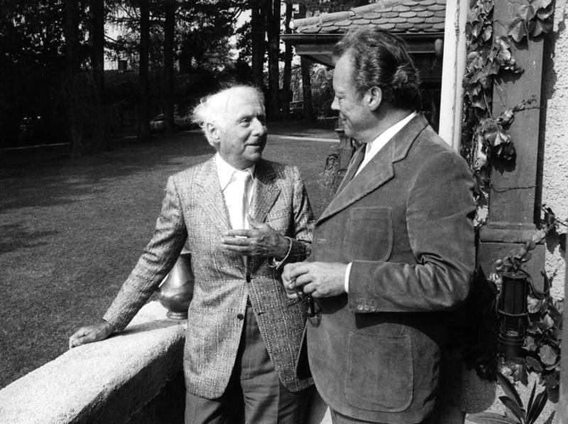 München, Olympische Spiele 1972 Bundeskanzler Willy Brandt empfängt in seinem Olympia-Quartier in Feldafing (Starnberger See) den Bildhauer und Maler Max Ernst.